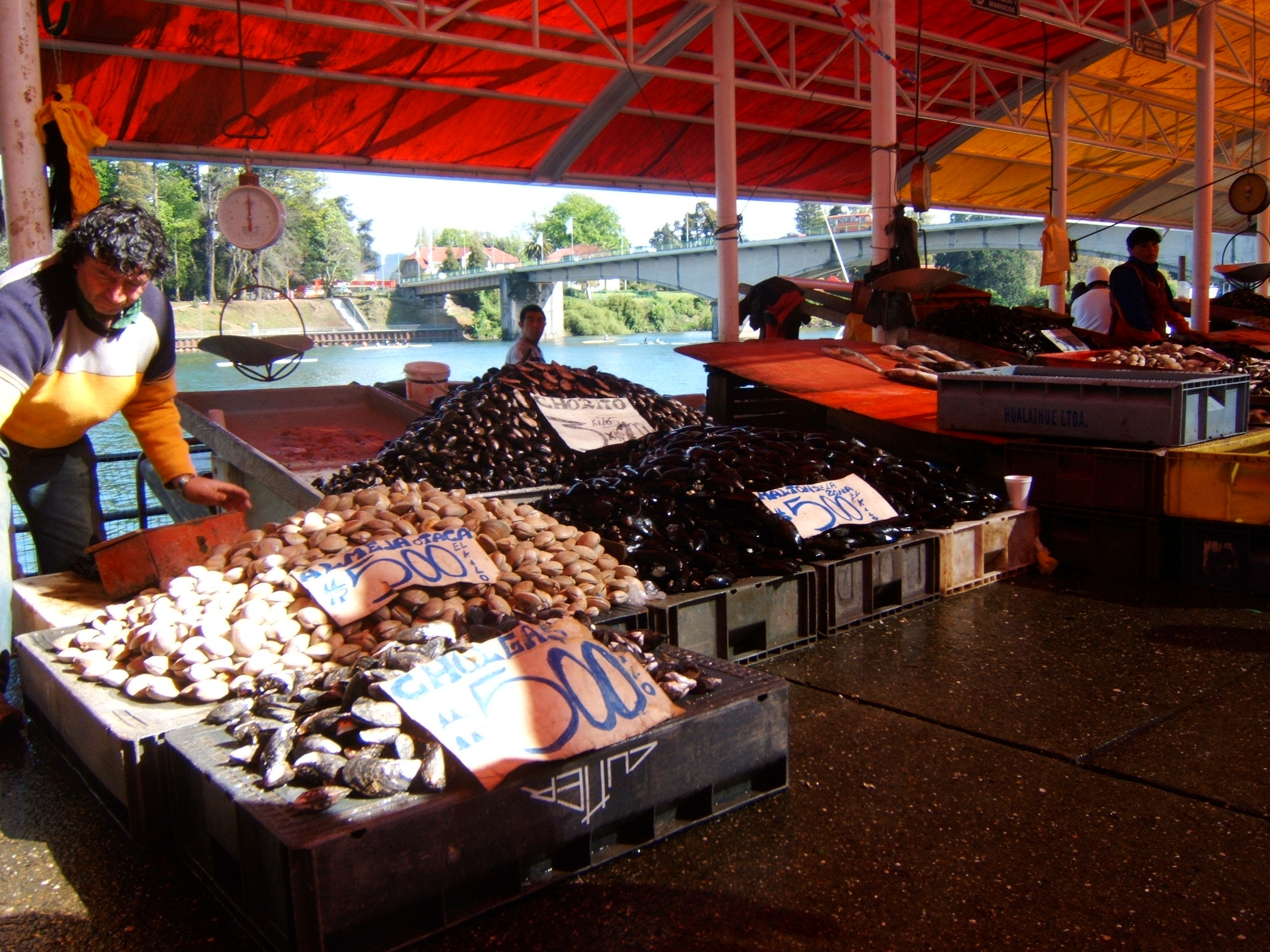 Feria del sábado, en Valdivia. This is a photo of a national monument in Chile: 2132